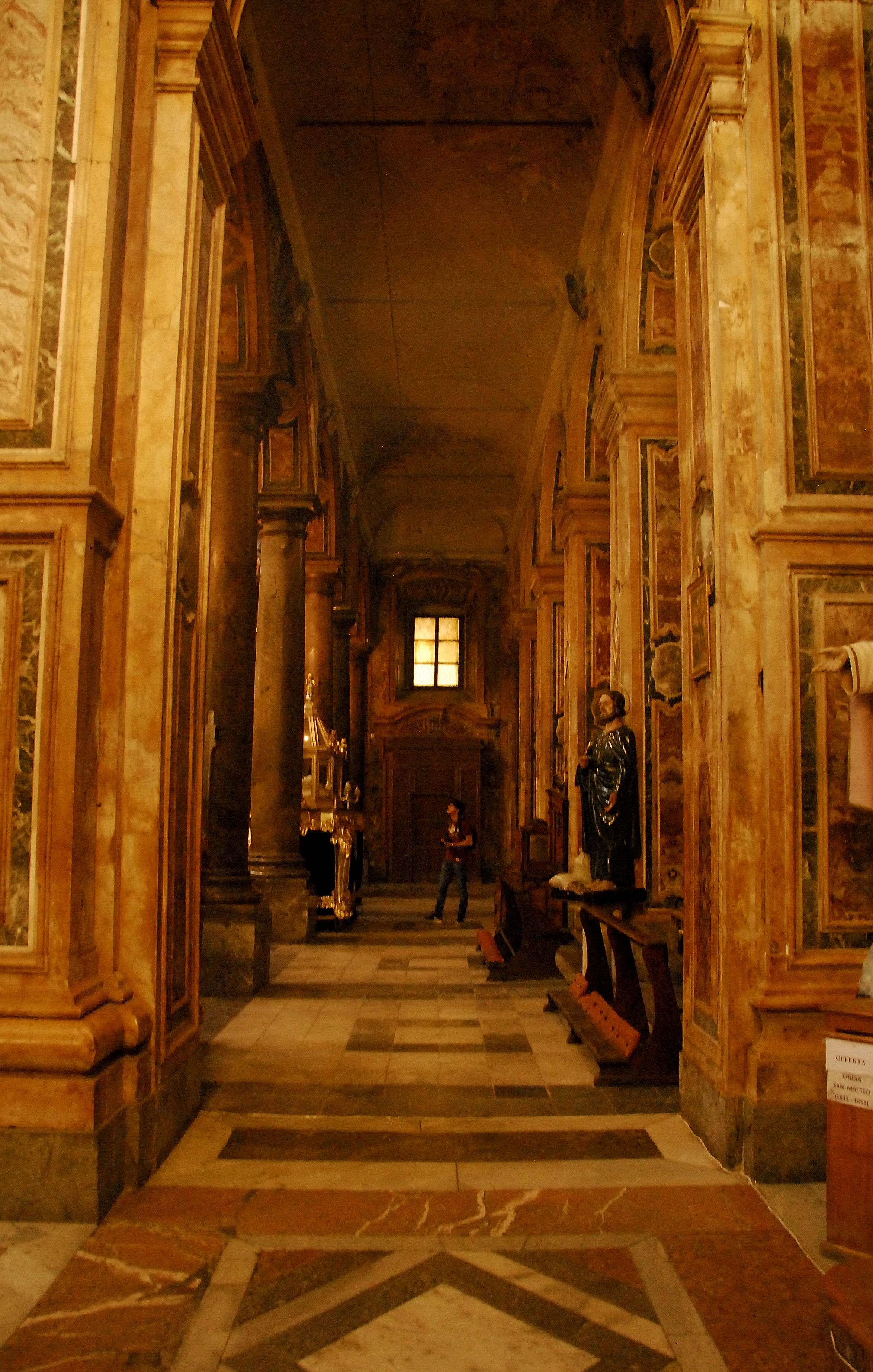 Palermo, ITA